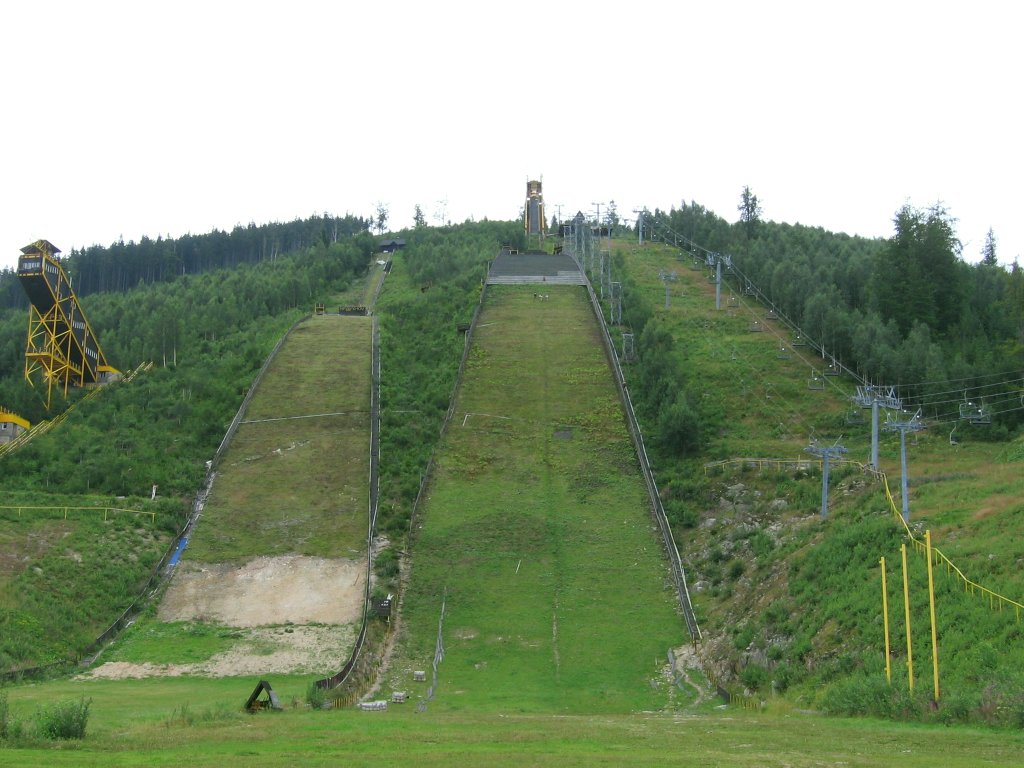 Harrachov - mammoth ski-jump.